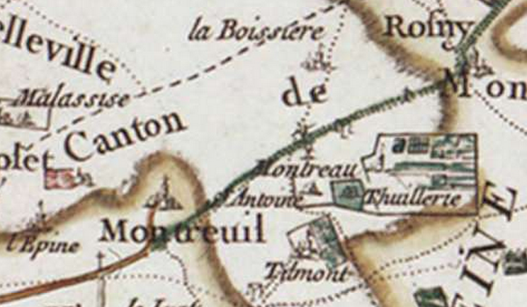 Montreuil-sous-Bois sur la carte de Cassini, xviiie siècle.